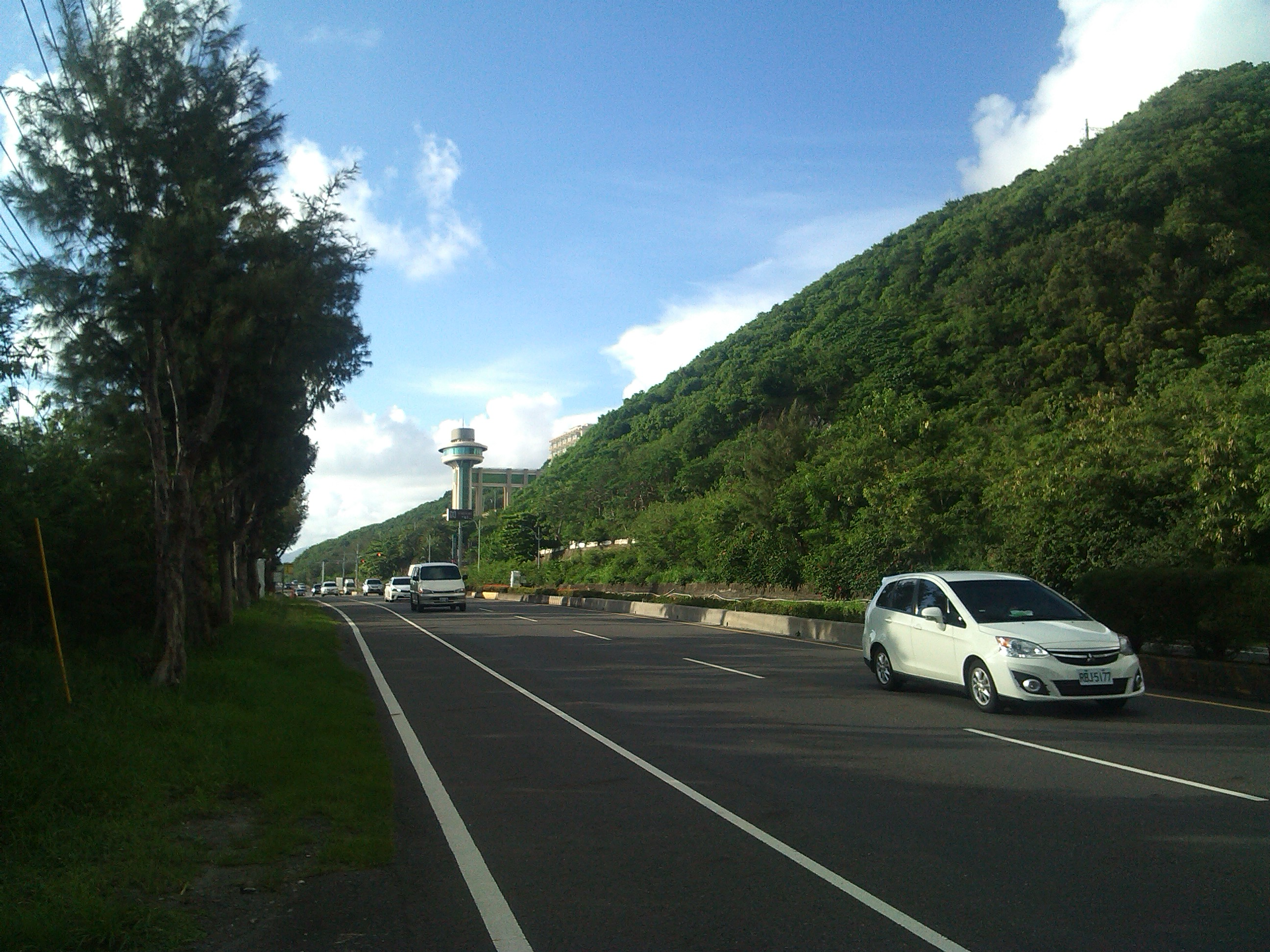 台26線5.8K處